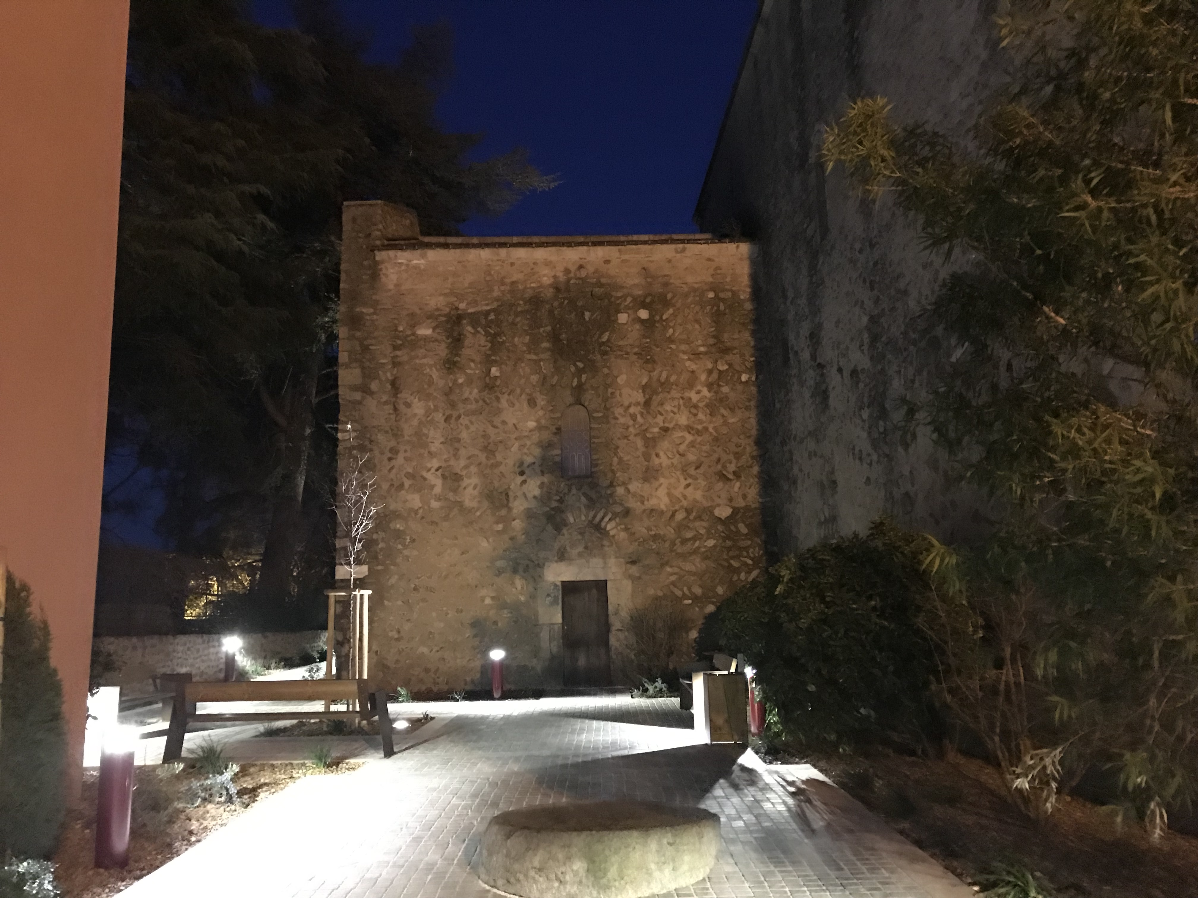 coté de l'église de nuit